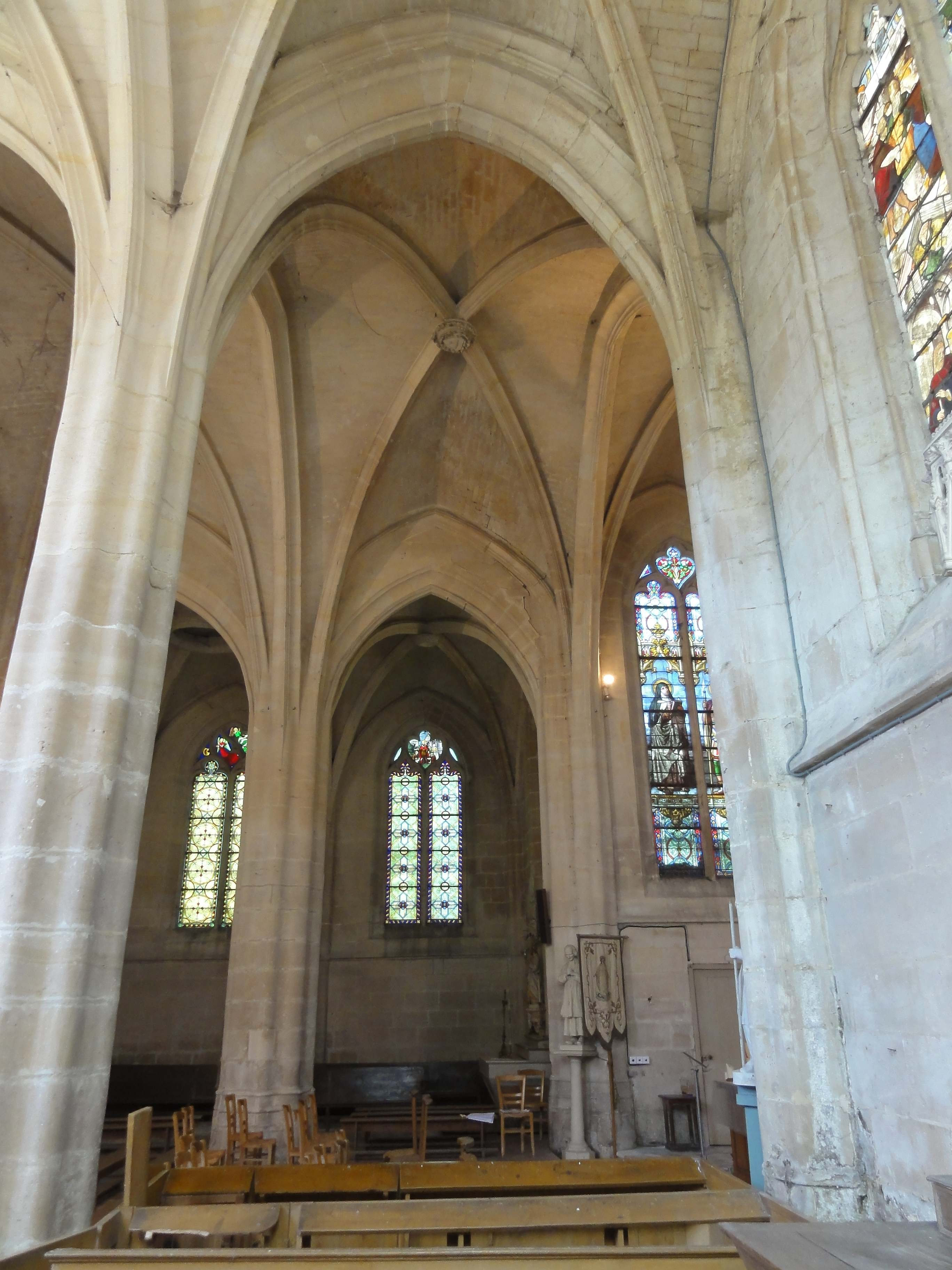 Intérieur de l'église (voir titre).